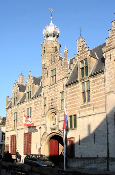 Bergen op Zoom, Markiezenhof, januari 2004, eigen foto